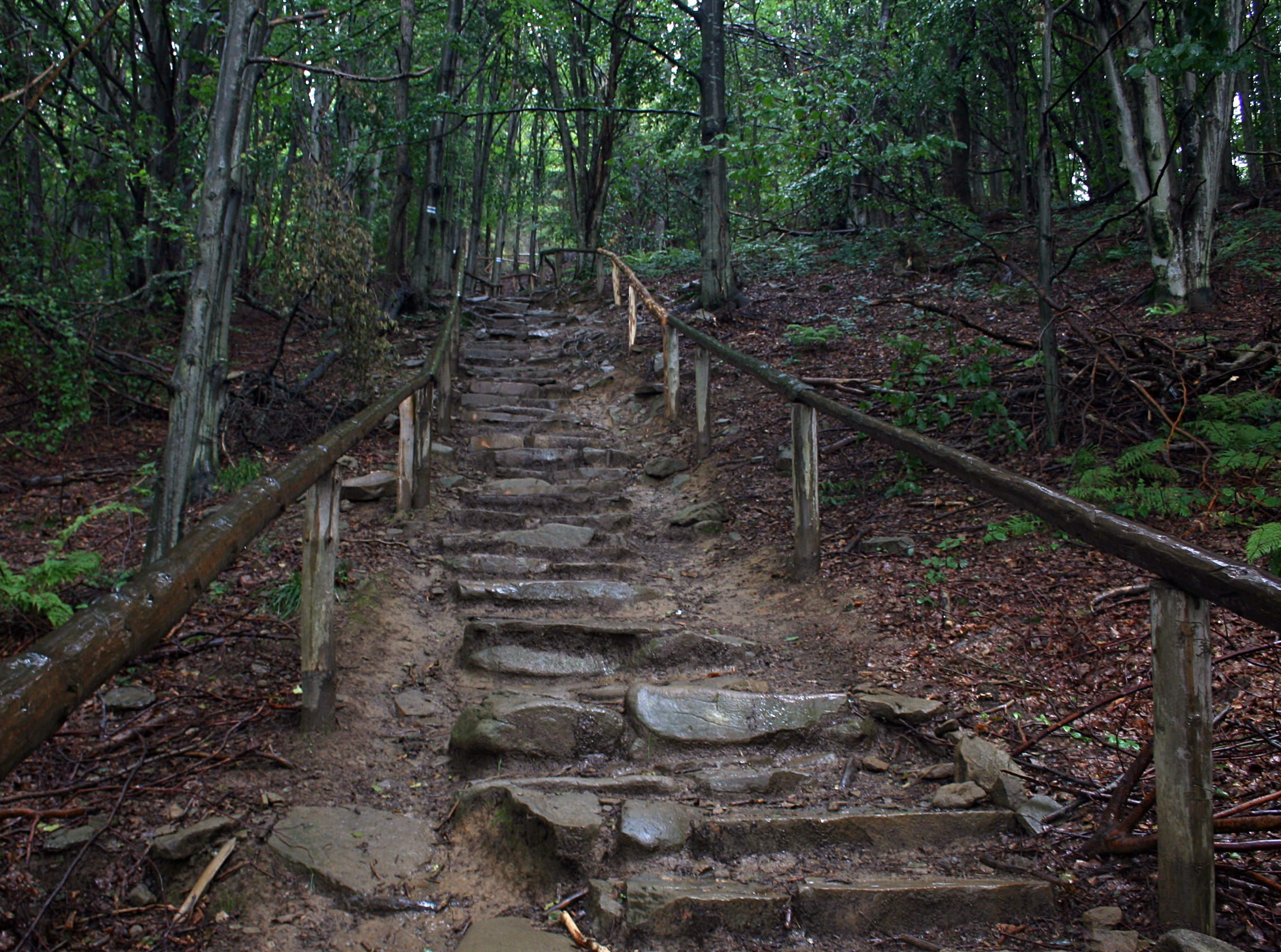 Schody na szlaku turystycznym Wołosate - Tarnica, Bieszczadzki Park Narodowy